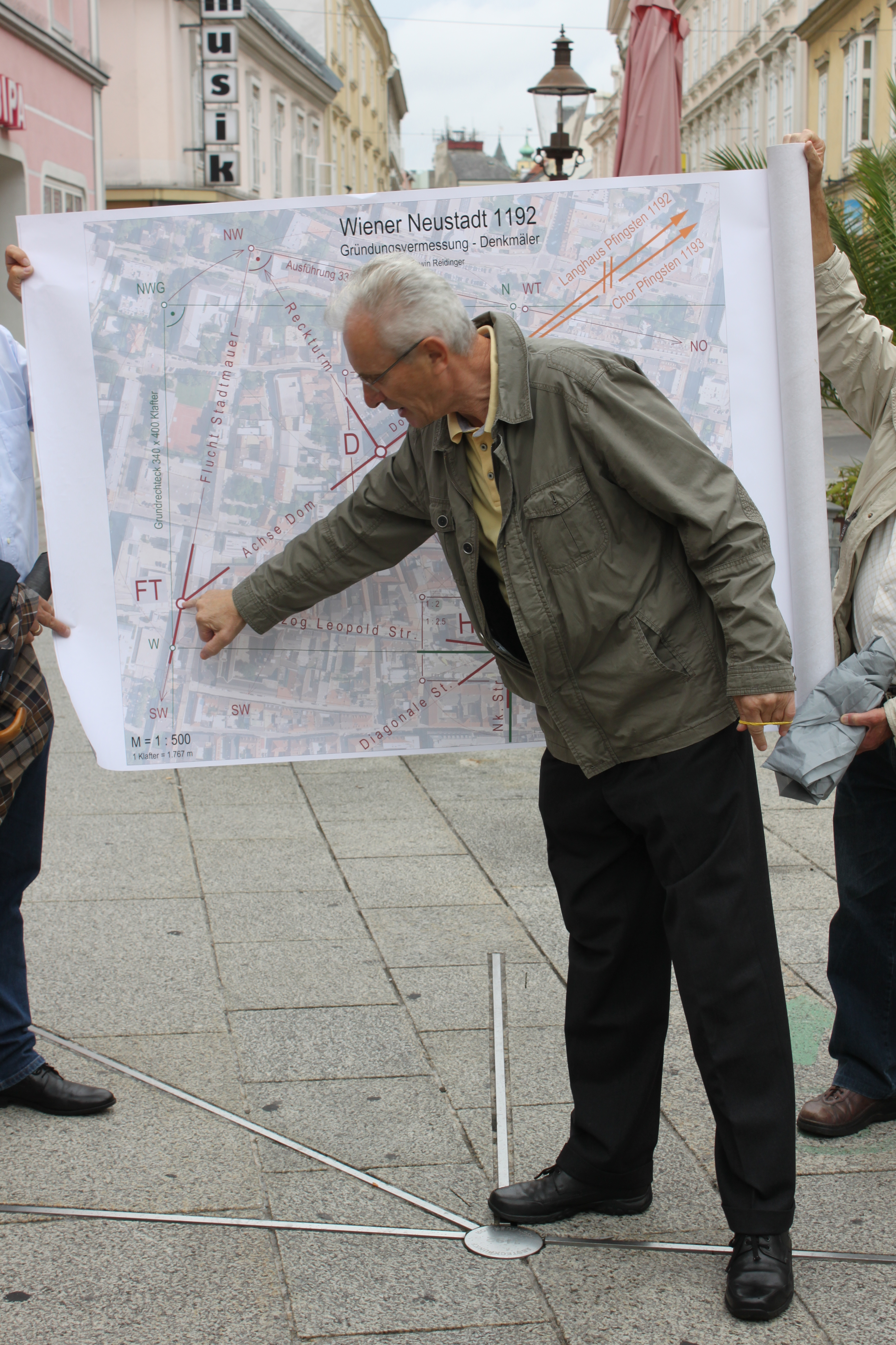 Das Fischauer Tor in Wiener Neustadt. Um 1900 demoliert. Platz über der Theatergarage. Erwin Reidinger erklärt die Gründungsvermessung der Stadt Wiener Neustadt. Mit dem Absteckpunkt bei Neutor, später Fischauer Tor. Strahl links zum Reckturm, halblinks zum Dom, Achse des romanischen Langhauses, mittig zum durch die heutige Herzog Leopold Straße, rechts zum Südwestpunkt der Stadtbefestigung. Die Richtungszeiger im Boden haben die Länge der ehemaligen Maßeinheit: 1 Klafter ist gleich 1, 767 Meter. (1° = 1,767m)